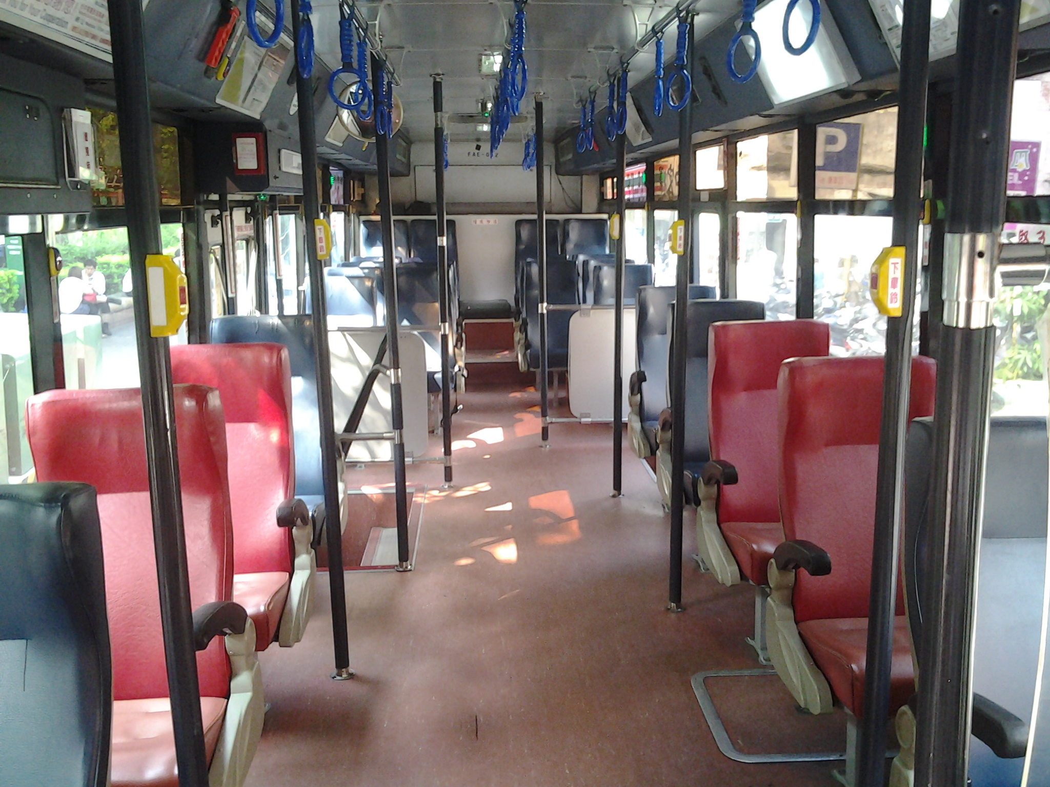 台中客運 2005〈2012〉 HINO ERK2JRL（馨盛）內裝